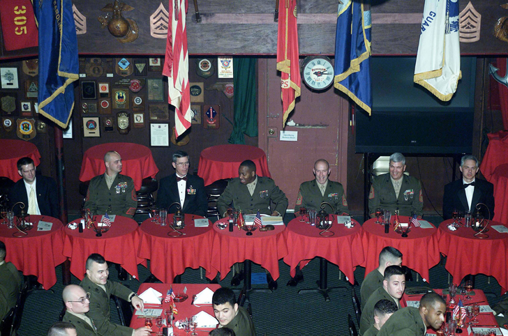 Mess Night at Camp Lejeune